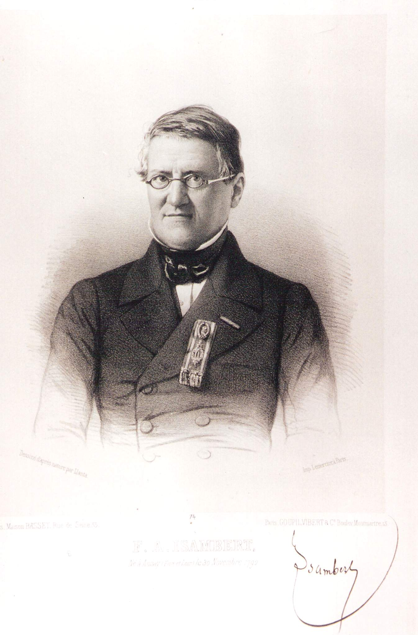 Représentant du peuple à l'Assemblée constituante de 1848